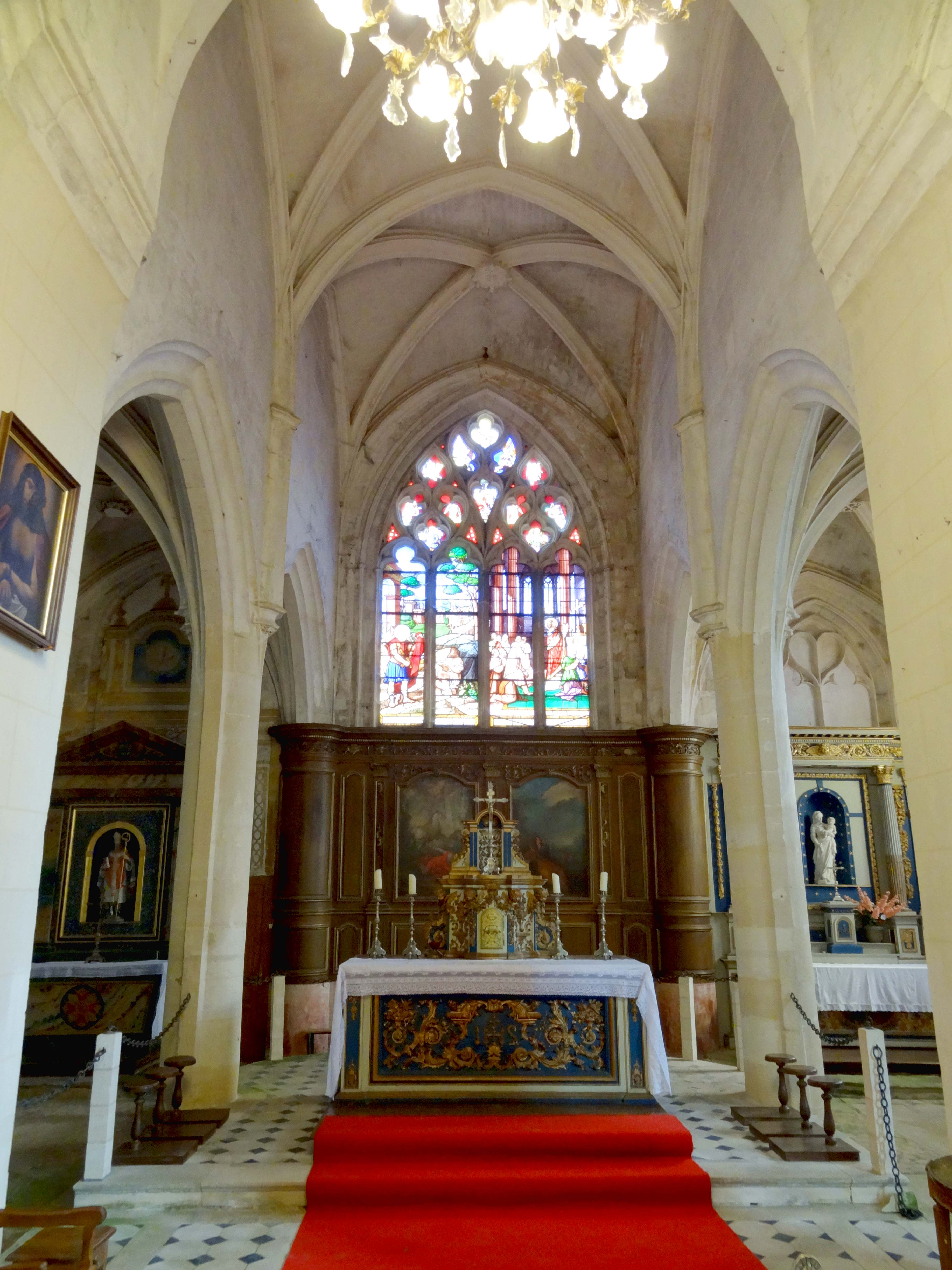 Intérieur de l'église - voir titre.